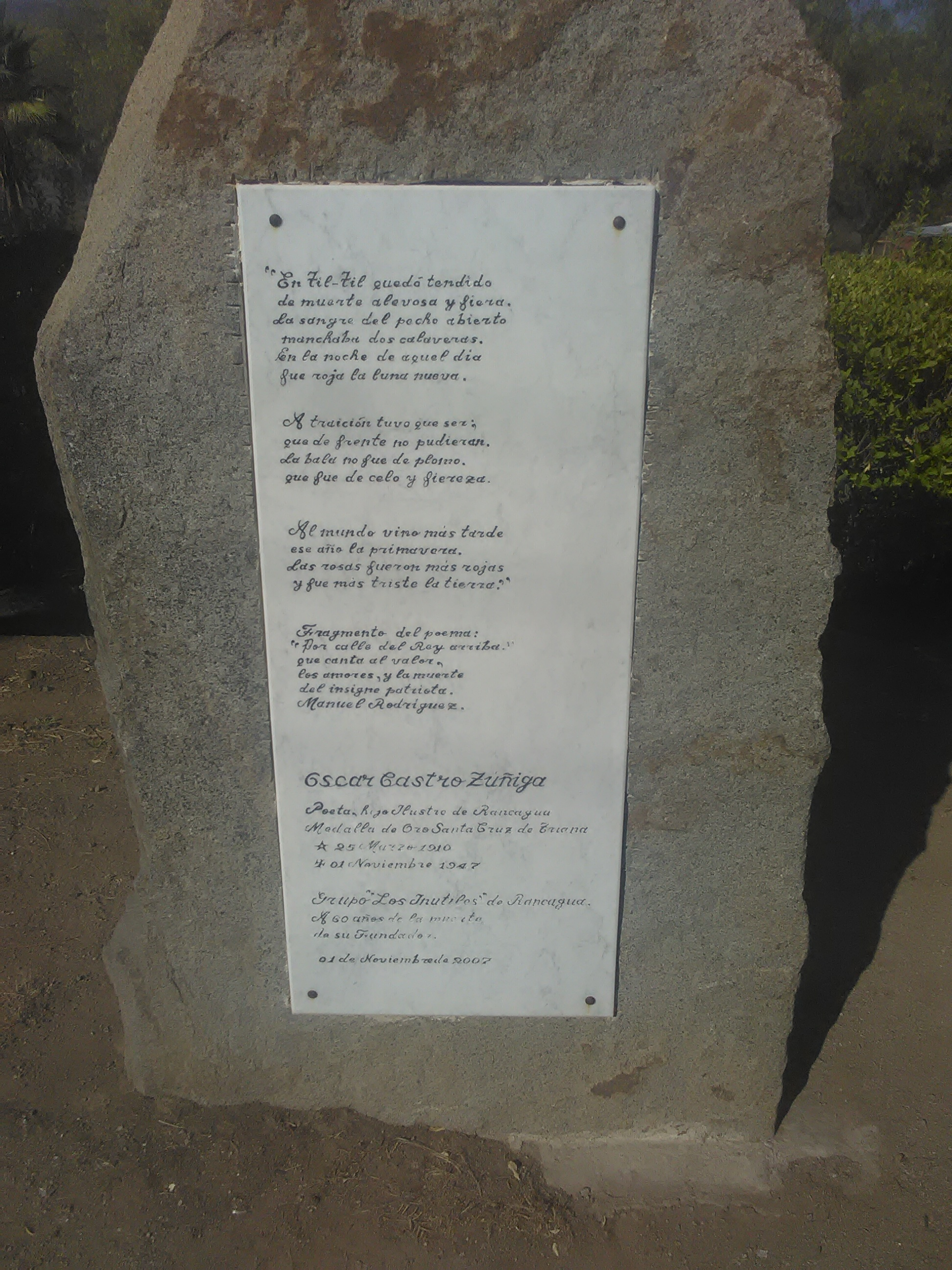 Poema a Manuel Rodríguez erigido en piedra junto al monumento